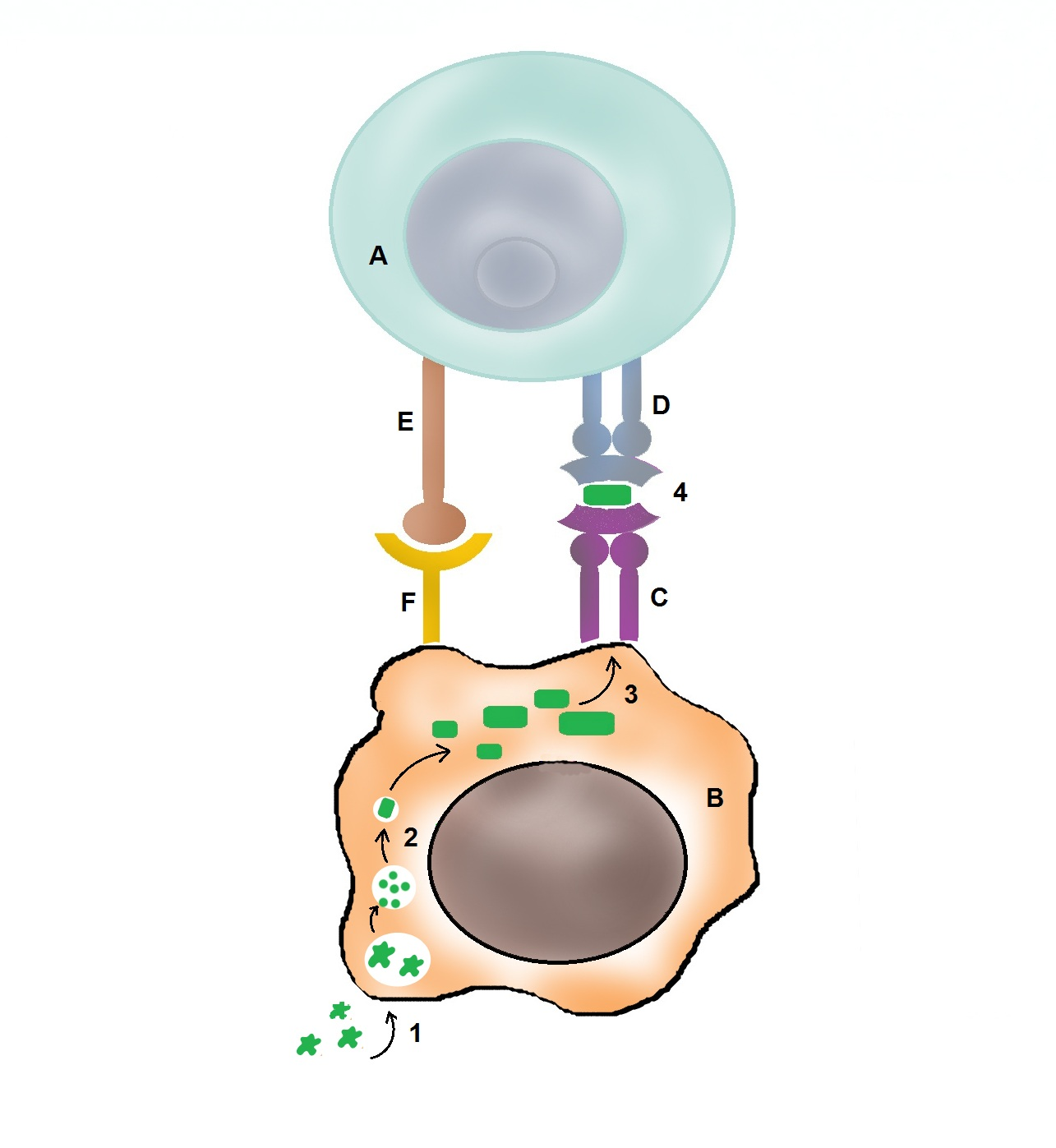 ടി-ലസികാണുവിനു മുന്നിൽ പ്രതിജനകാവതരണം നടത്തുന്ന ദ്രുമികകോശം: A.